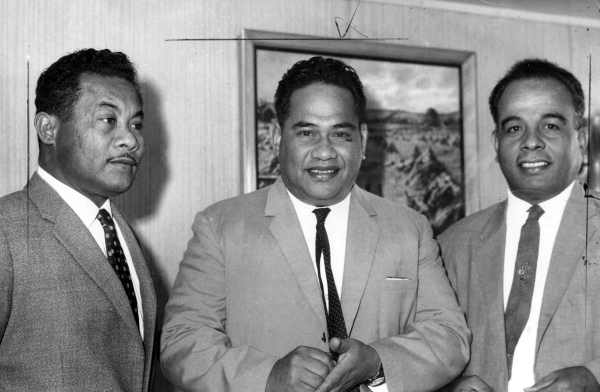 Bild durch den Hotmail-Benutzer "Dokai" ([1]) autorisiert und unter der GFDL freigegeben; auch veröffentlicht durch "Dokai" unter [2] Bilde:Gadabu og DeRoburt 1968.jpg